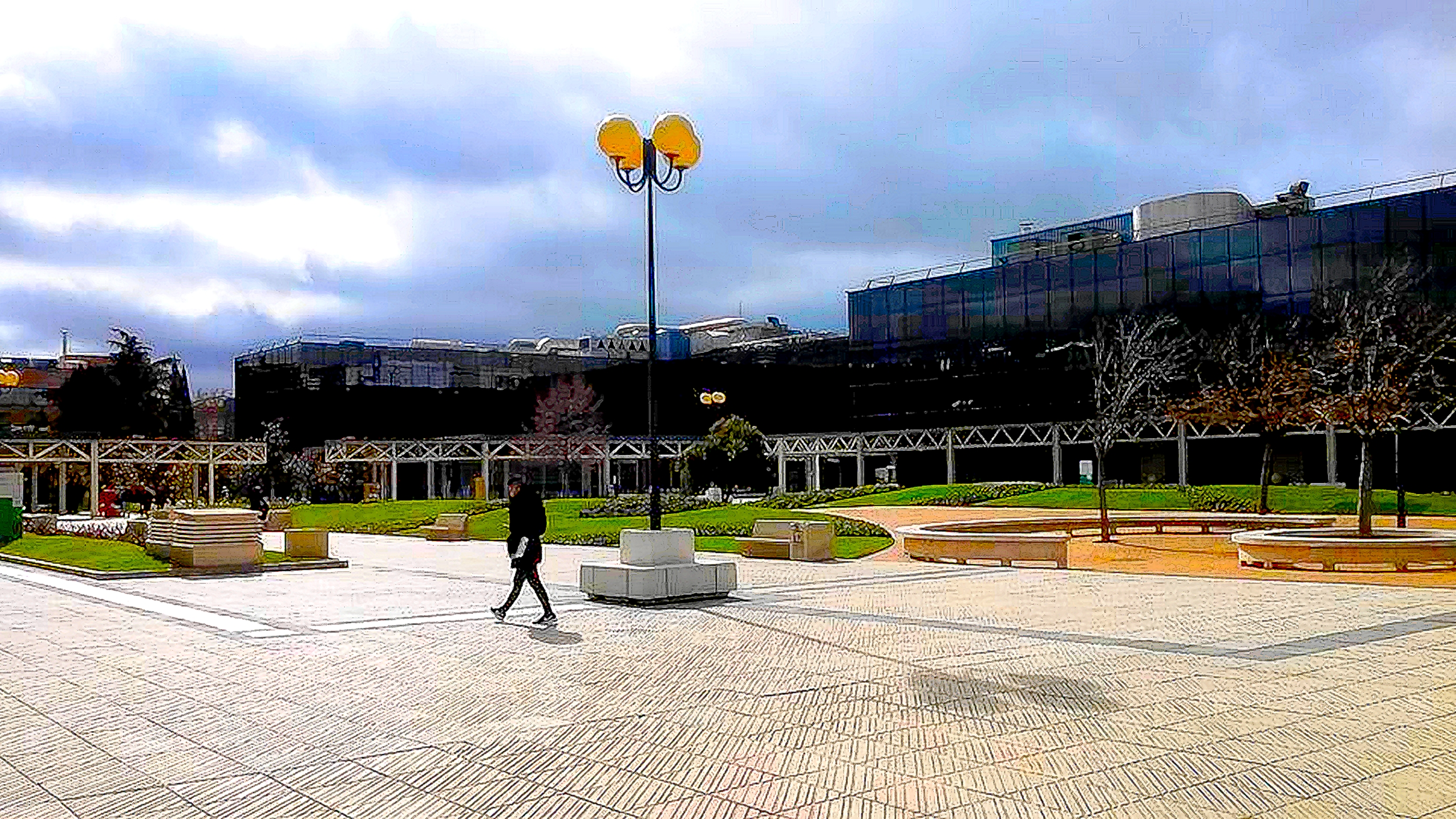 Zonas peatonales y comerciales del parque empresarial de San Fernando de Henares.